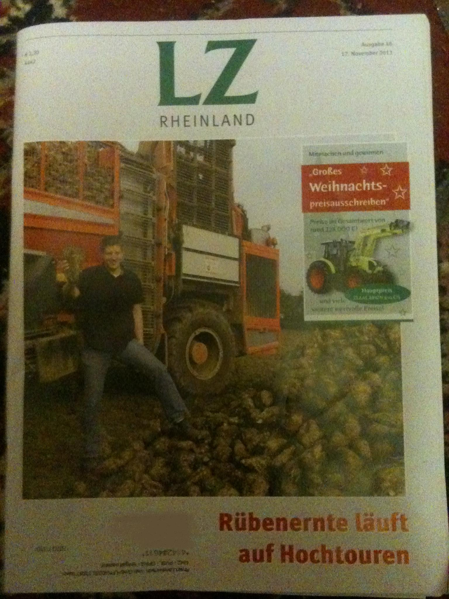 Ausgabe 46 der LZ Rheinland 17.November 2011